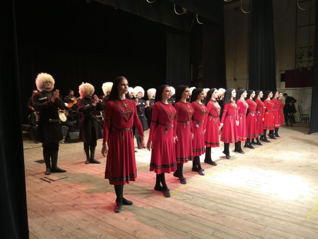 Фото было сделано мной на концерте 22.10.2017 года в Городском Доме Культуры в рамках Фестиваля "Кавказ-мой дом". На фото изображен полный состав ансамбля Золотое Руно.